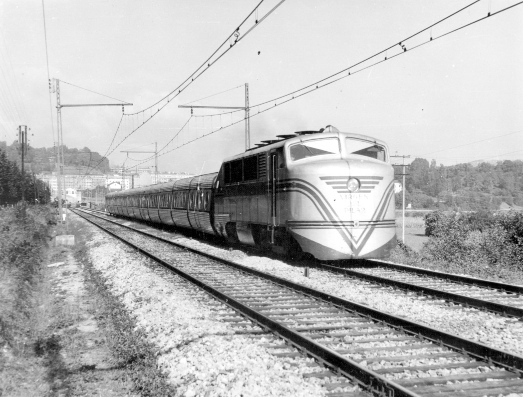 La "Virgen del Pilar" cerca de San Sebastian. Collection Jean-Pierre Vergez-Larrouy.